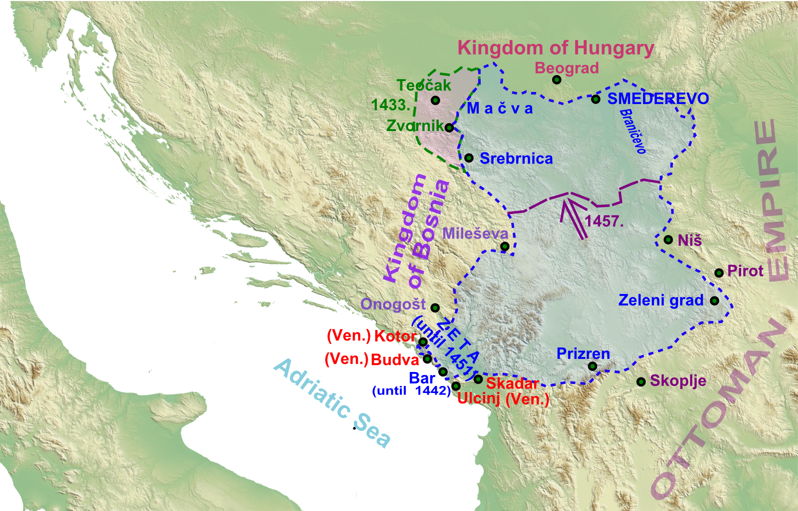 Srpski (latinica): Srpska Despotovina Đurađa Brankovića, oko 1450. godine.